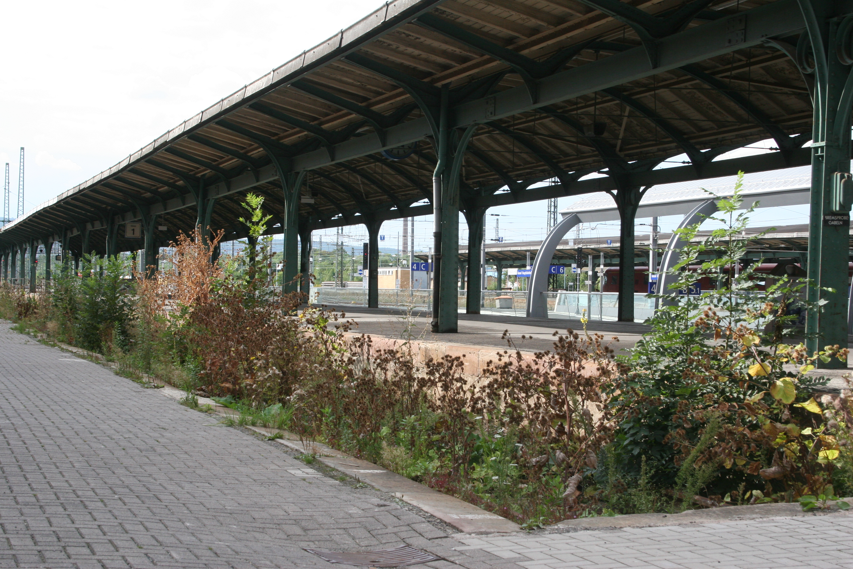 Lois Weinberger (Künstler) Beitrag zur Documenta X (1997): "Das über Pflanzen / ist eins mit ihnen"